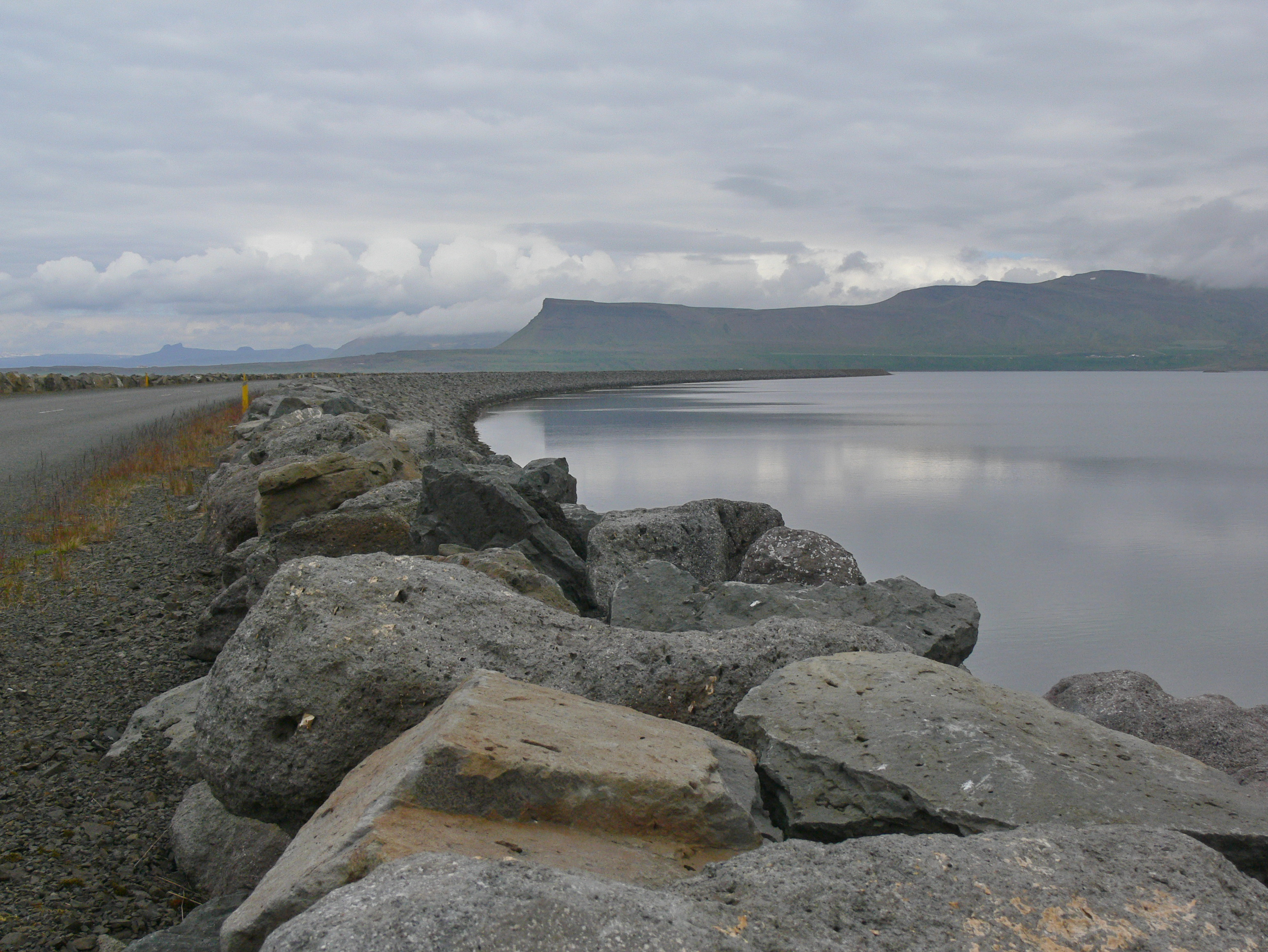 Straßendamm am Gilsfjörður am Ende des Breiðafjörður